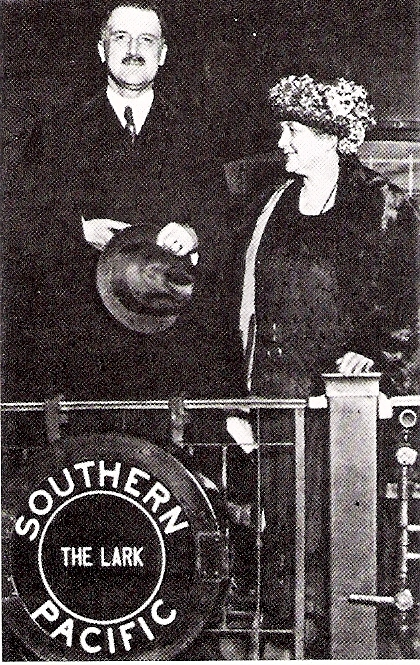 Fotografia del 1922 di Amadeo Giannini e sua moglie